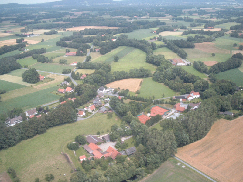 Koelkebeck, Ortsteil von Halle (Westfalen), aus der Vogelperspektive. Blickrichtung ist Teutoburger Wald. Fotografiert von einer Position ueber dem Dallweg aus.